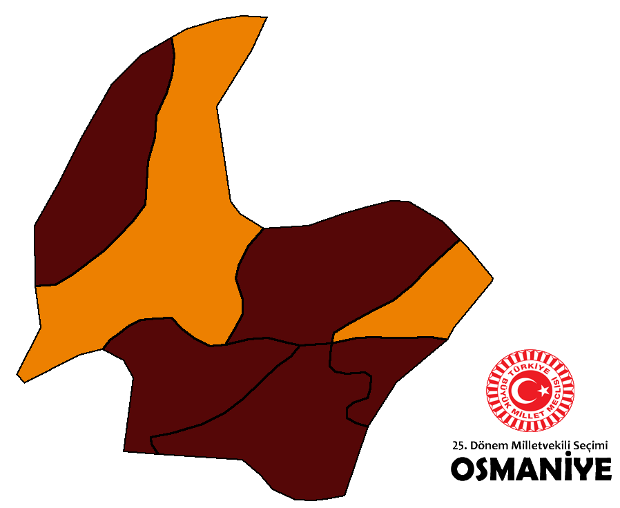 2015 genel seçim sonuçları